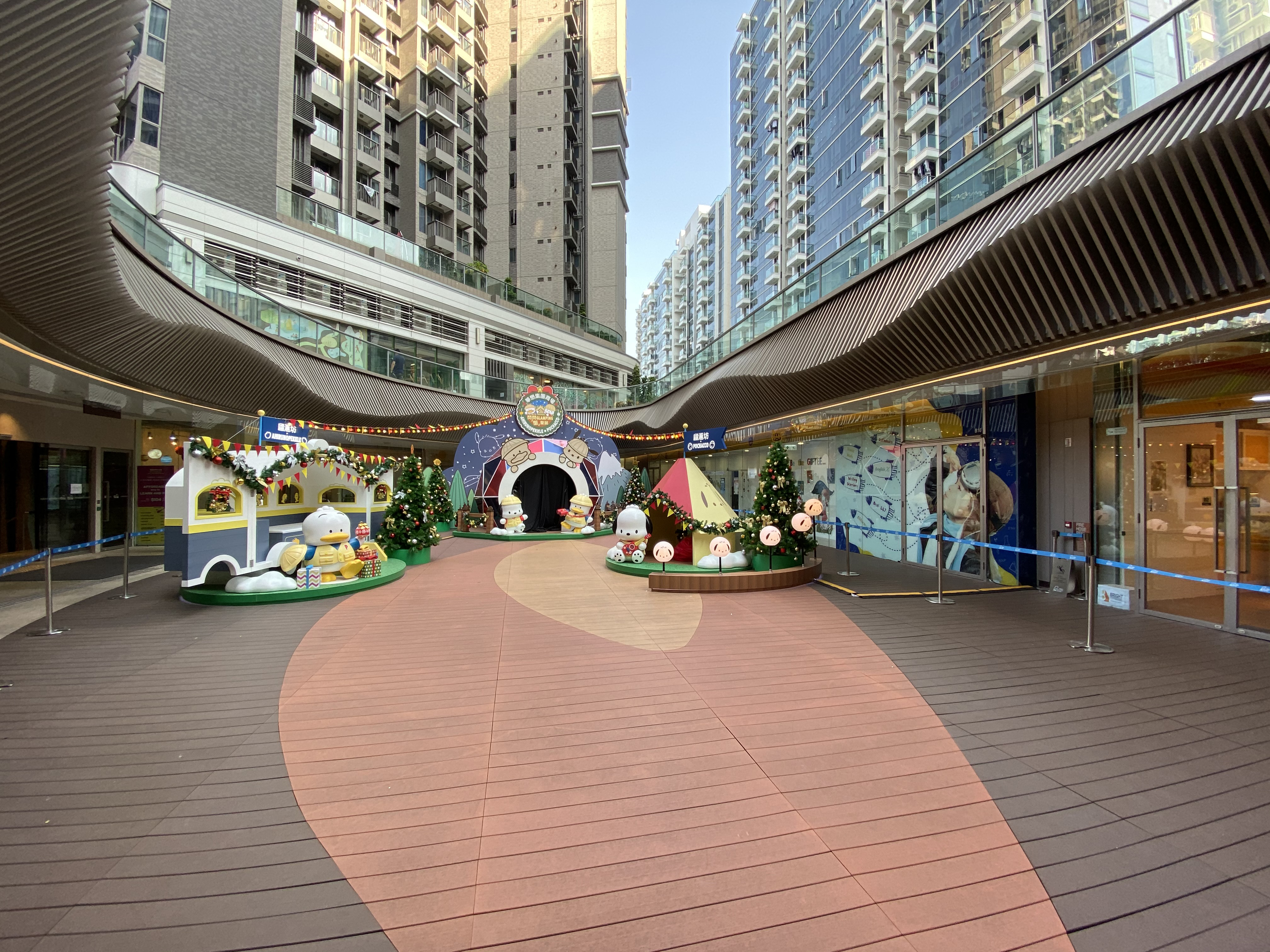 Papillons Square Courtyard